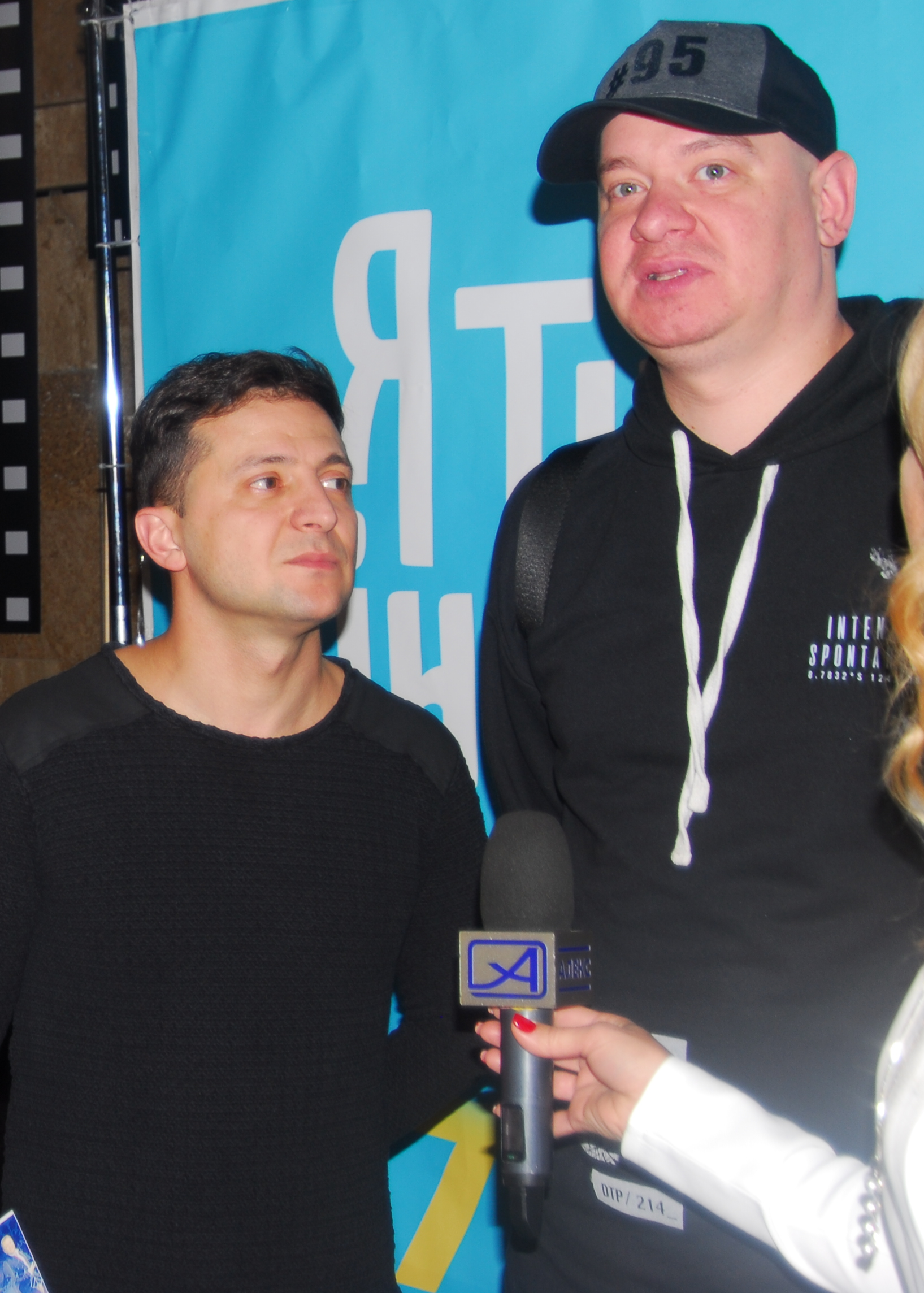 Премьера фильма "Я, Ты, Он, Она" в кинотеатре Довженко